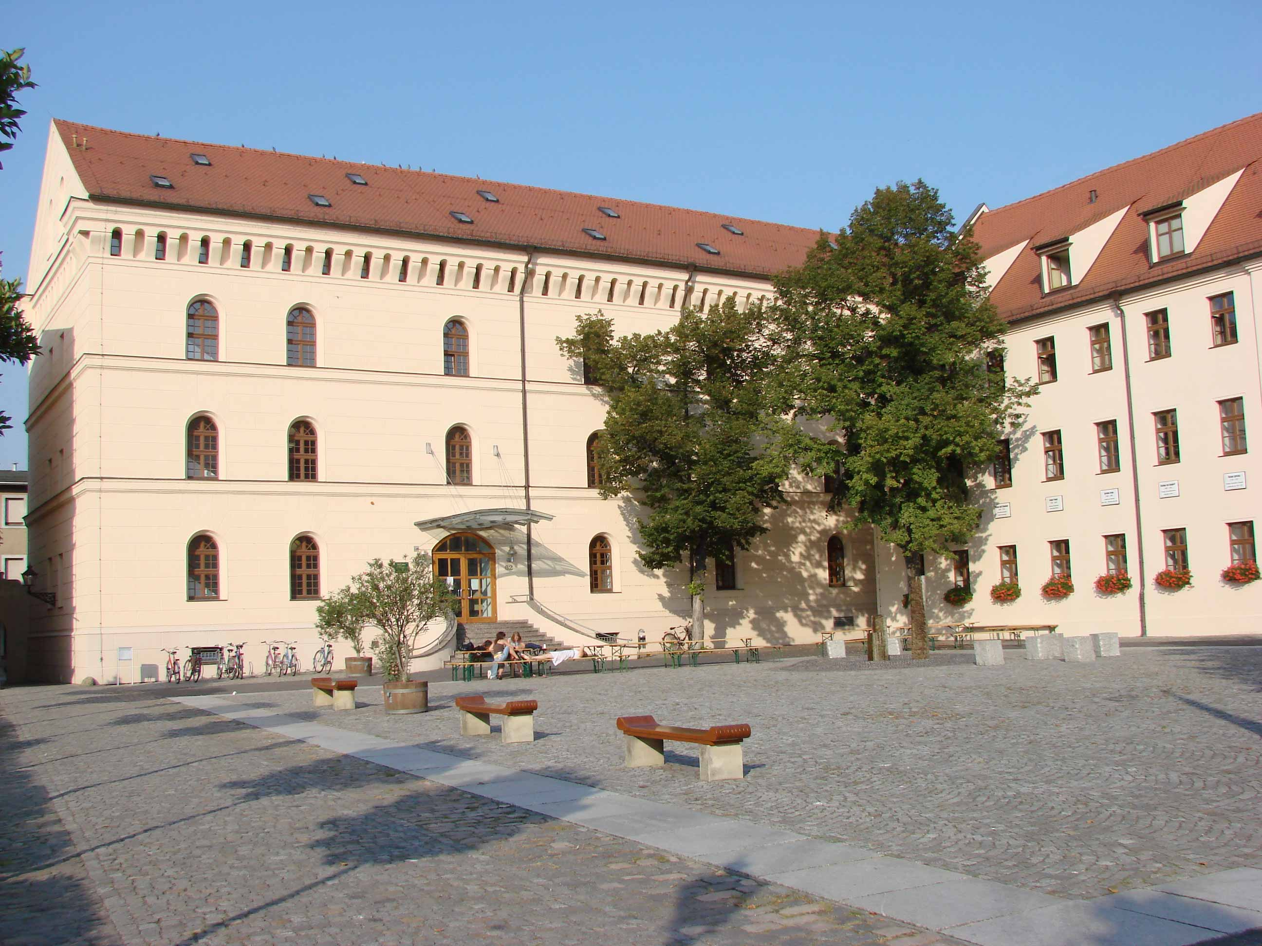 Der nördliche Innenhof des Leucorea Gebäudes in der Lutherstadt Wittenberg